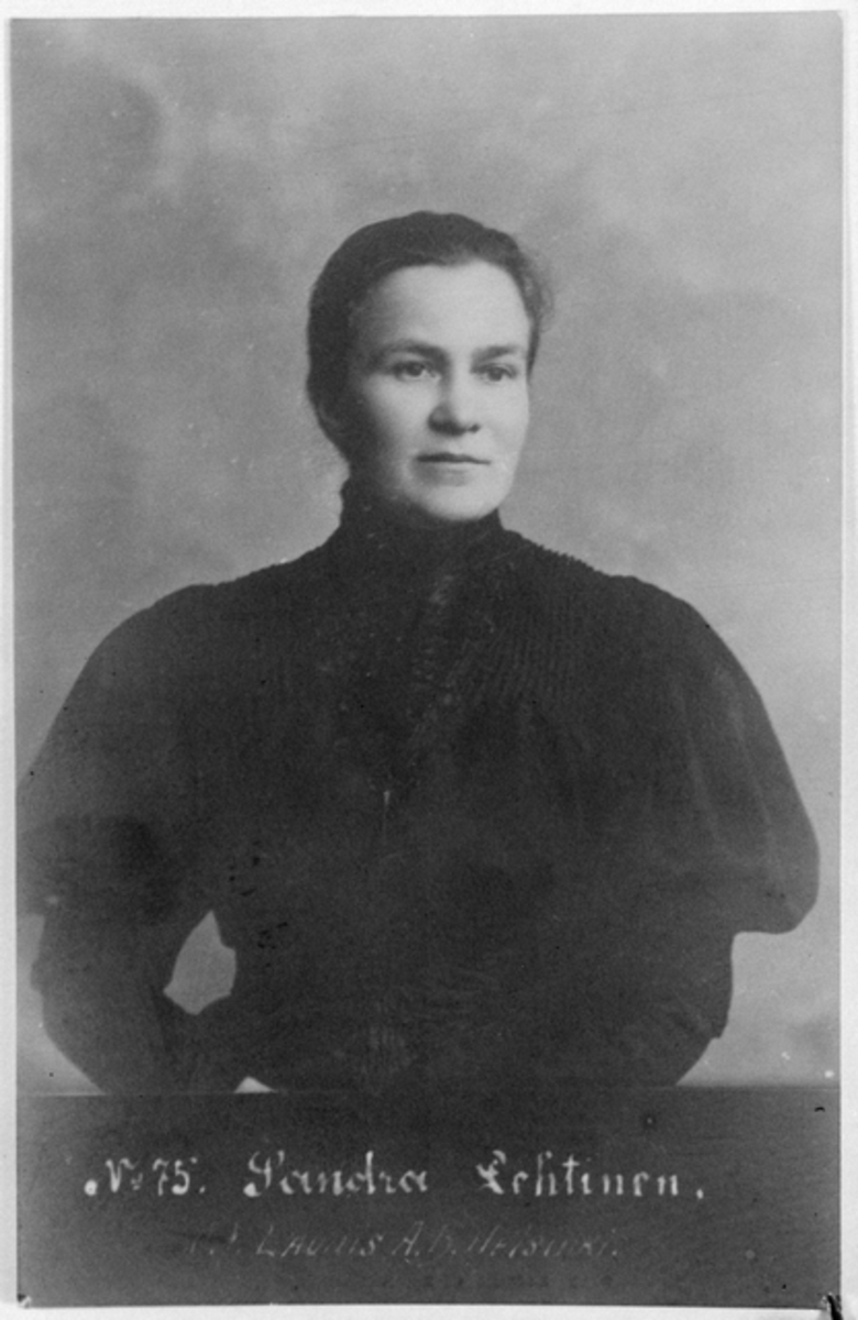 kansanedustaja Sandra Lehtinen; pysty, mustavalkoinen, liimattu yläreunasta kartongille, kolme muuta kuvaa